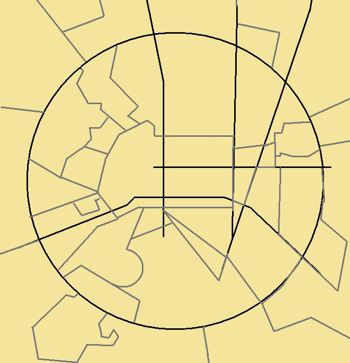 Mapa artesanal dos limites dos bairros da região central de Feira de Santana, Bahia, Brasil.